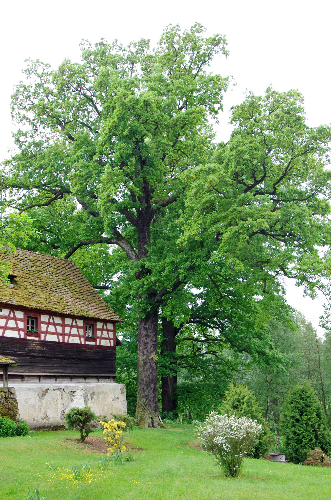 Památné stromy - Duby u statku Tuřany čp. 3, Tuřany, okres Cheb